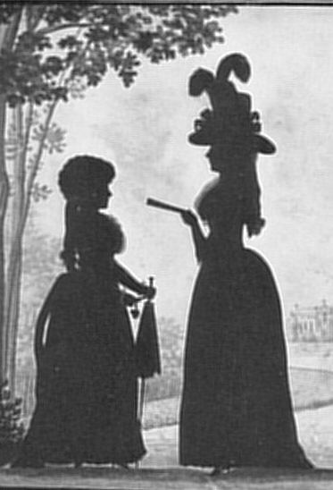 links Luise von Göchhausen und rechts Anna Amalia von Sachsen-Weimar um 1780 im Park Die für das letzte Viertel des 18.Jahrhunderts charakteristische Form des Porträts ist die des Schattenrisses, die in den achtziger Jahren ihre Blüte erreichte. Der Hauptsilhoutteur des Weimarer Kreises war wohl Starke, dem auch die Reihe der hier wiedergegebenen ganzfigurigen Schnitte zuverdanken ist. Die Persönlichkeiten sind schon früher genannt. Sämtliche Schattenrisse waren 1932 im Besitz der Sammlung Kippenberg, mit Ausnahme der Frau von Stein und Knebel, die 1932 im Besitz des Goethe Nationalmuseums in Weimar waren.